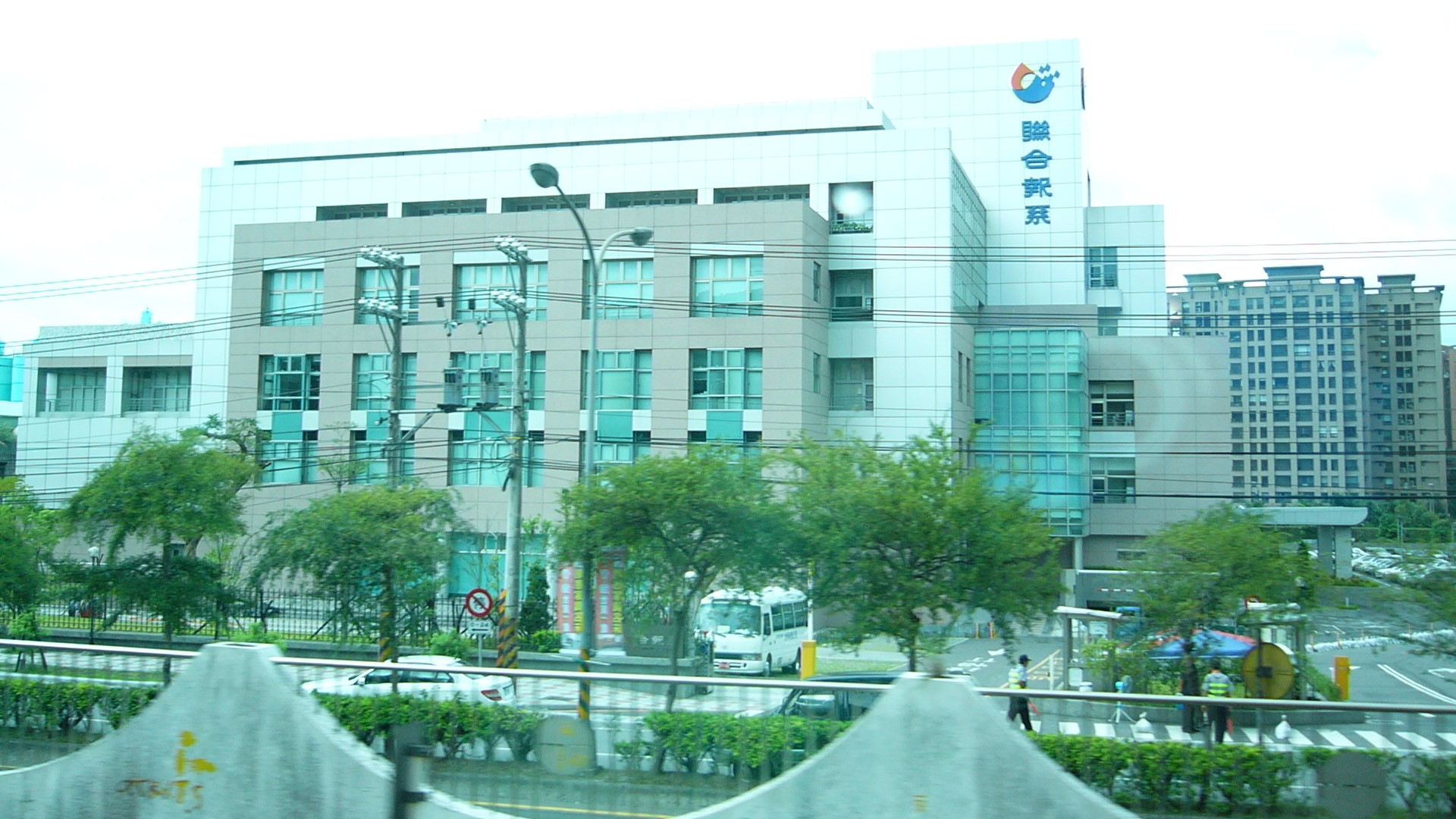 中文（台灣）: 從臺灣鐵路管理局南下列車遠望聯合報系總部。